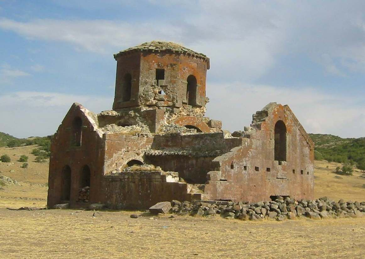 Kızıl Kilise (red church)